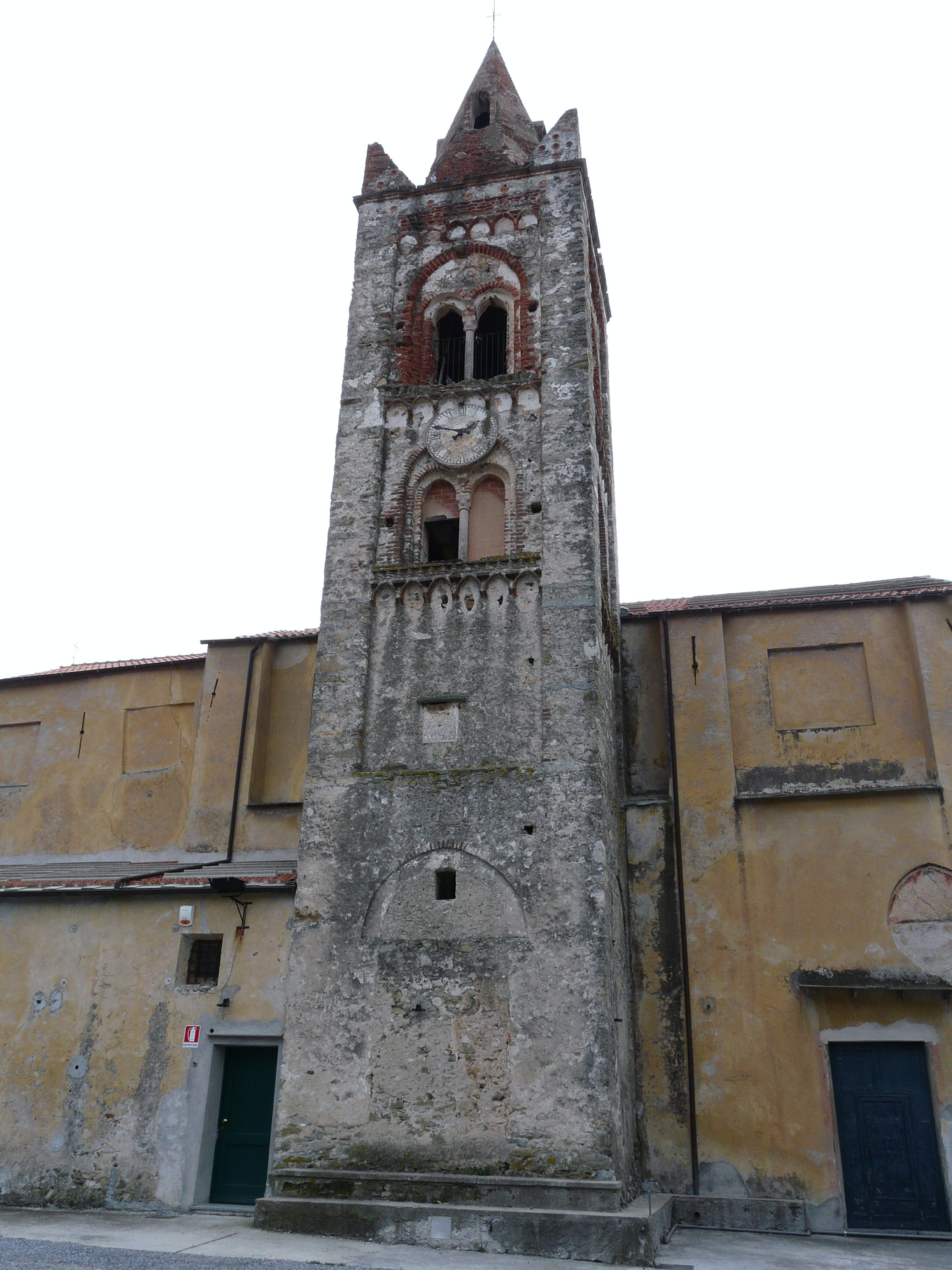 Chiesa di San Giovanni Battista, Bardino Vecchio, Tovo San Giacomo, Liguria, Italia